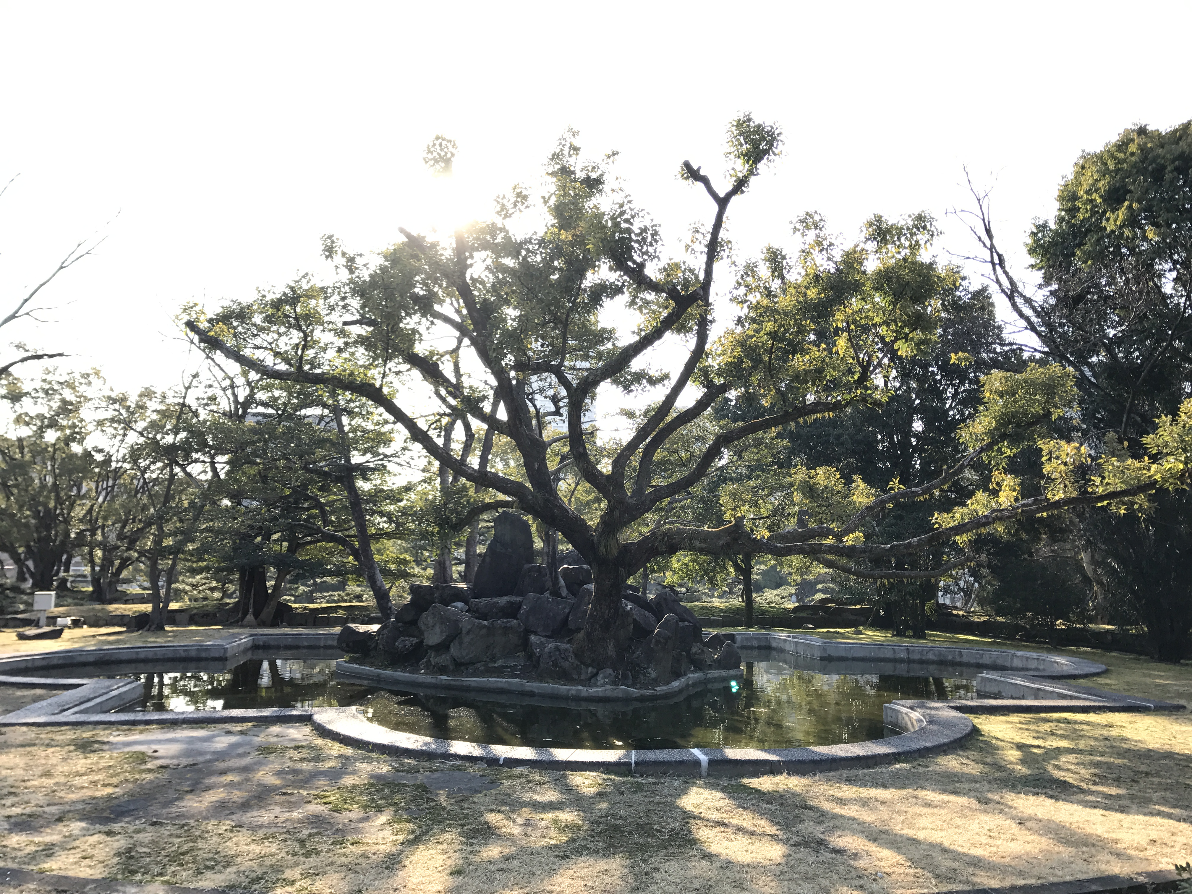 広島城本丸にある桜の池跡